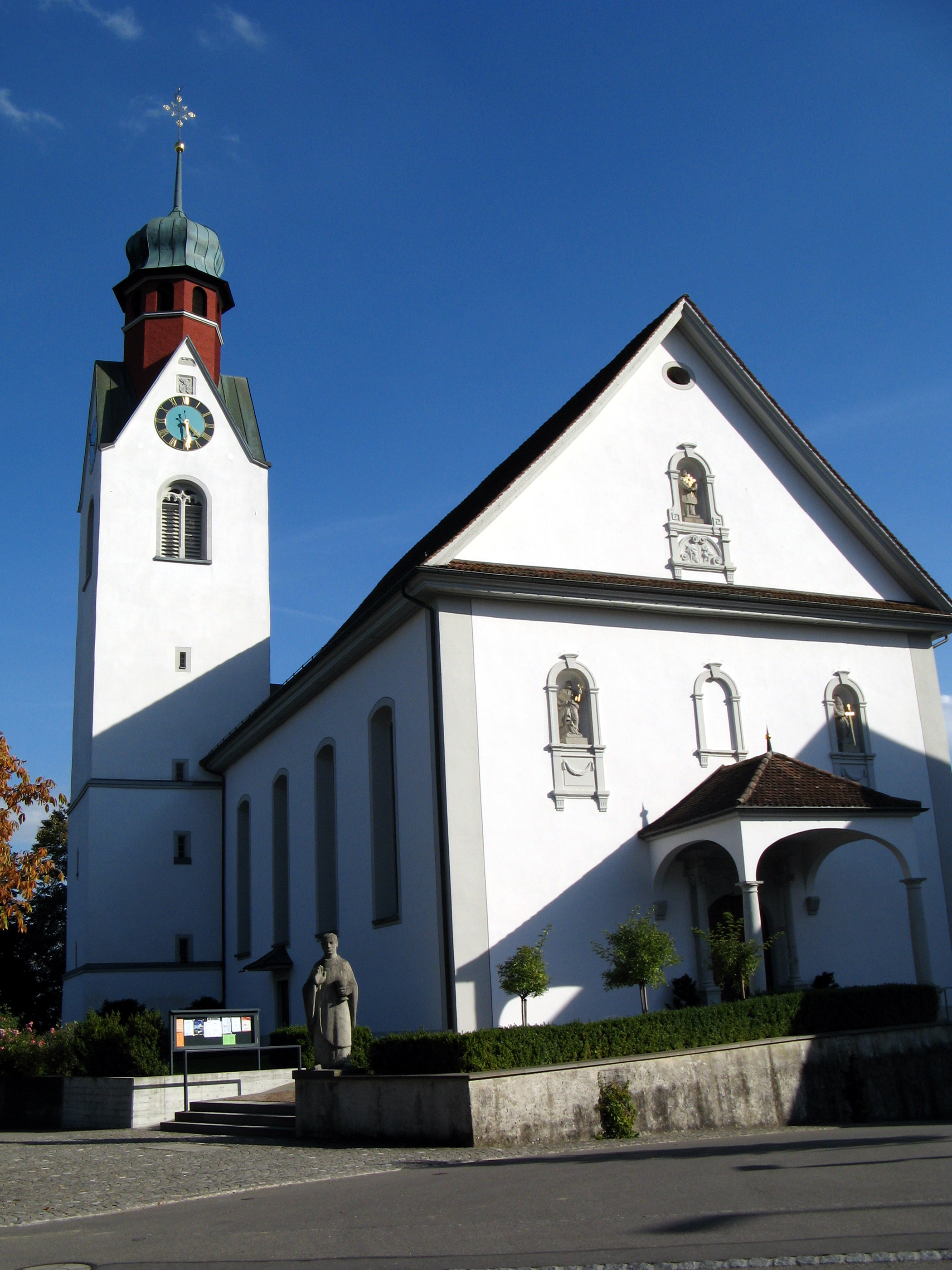 Kirche St. Burkhard in Beinwil (Freiamt), Aussenansicht